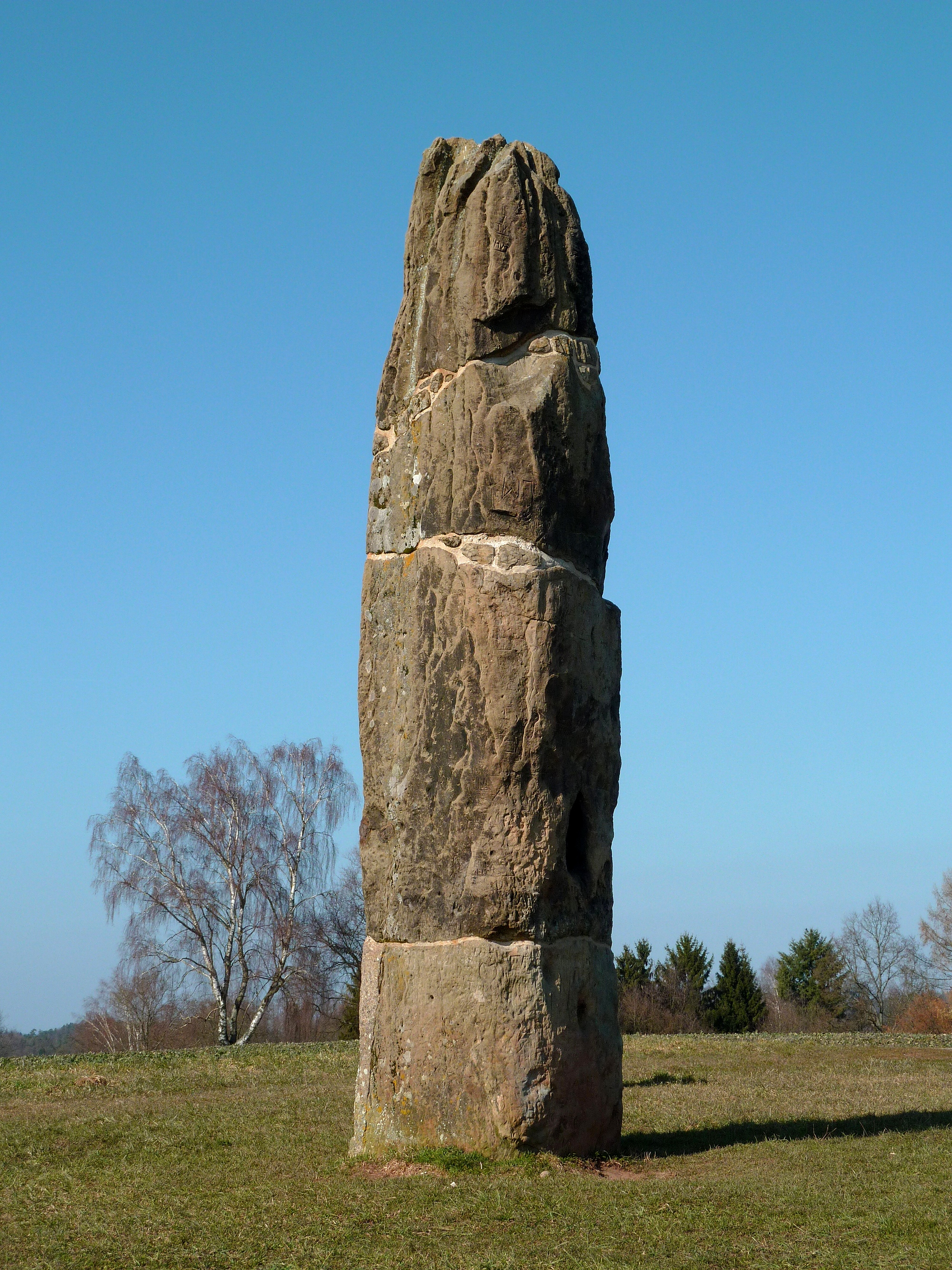 Der Gollenstein bei Blieskastel. Er ist ca. 4000 Jahre alt.